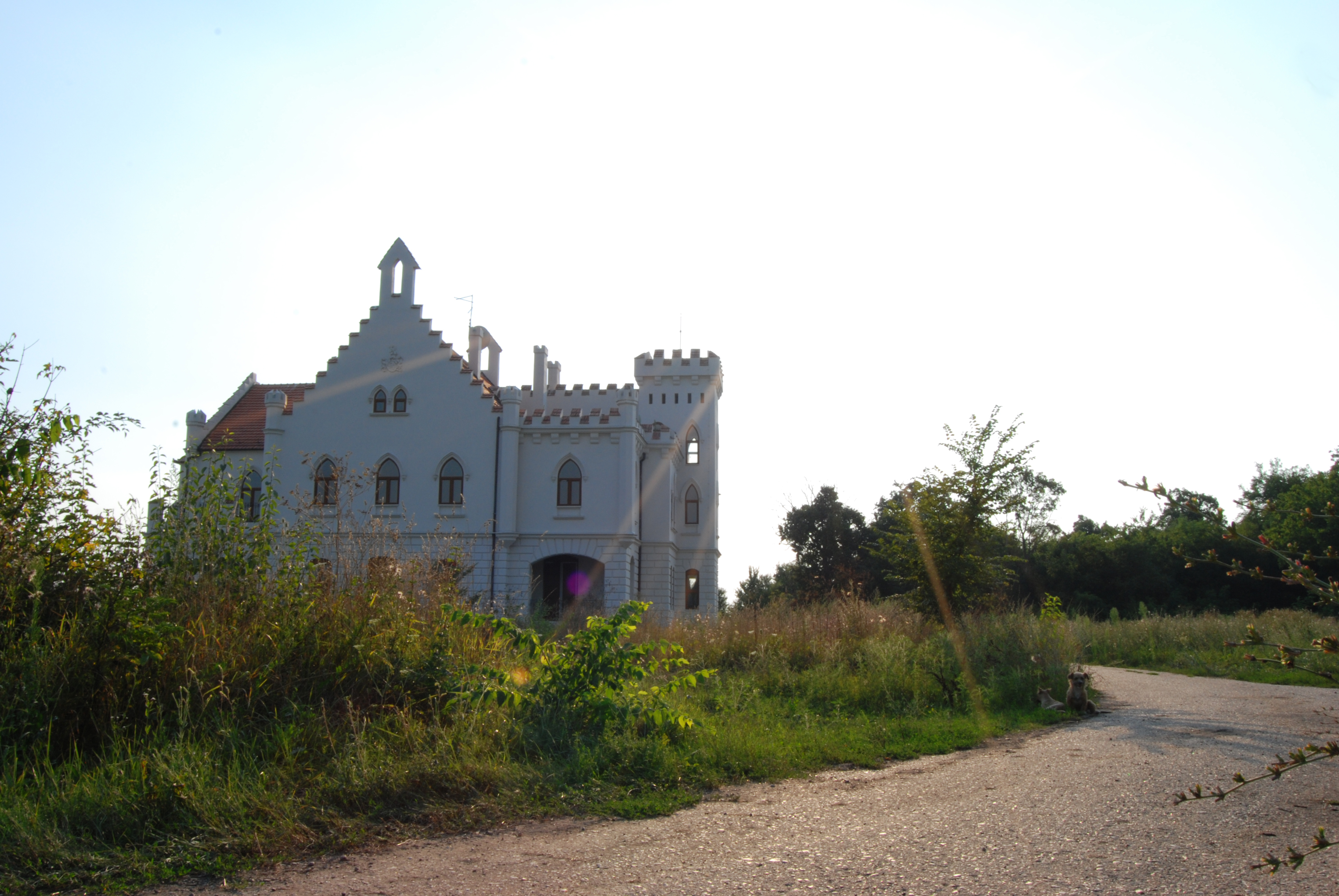 Дворац Капетаново код Старог Леца